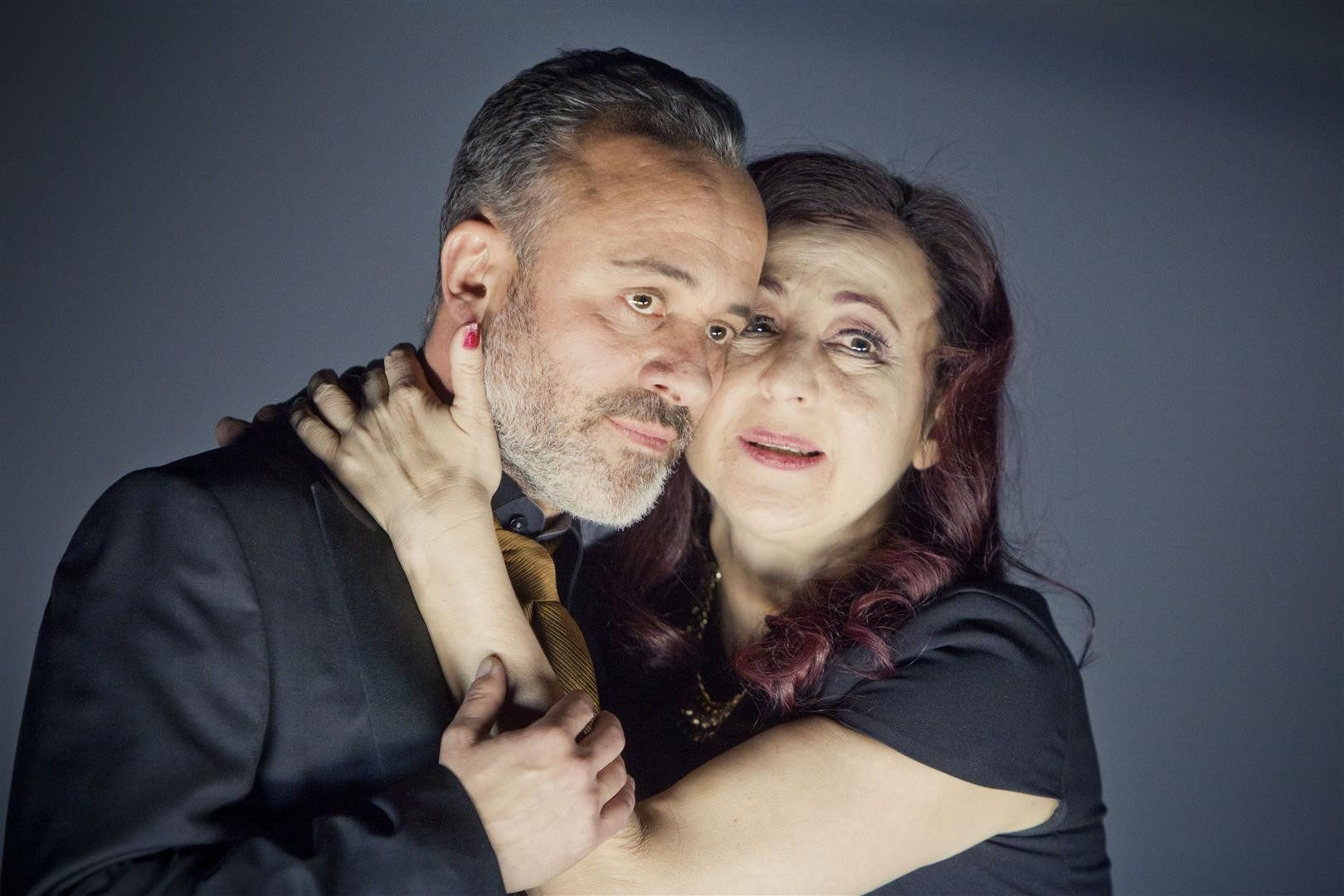 Antigua Universidad Renacentista 18-19 julio 22.45h. Los Mácbez Cía: Los Mácbez Madrid D: 120 min. P: 20€, 25€ y 27€